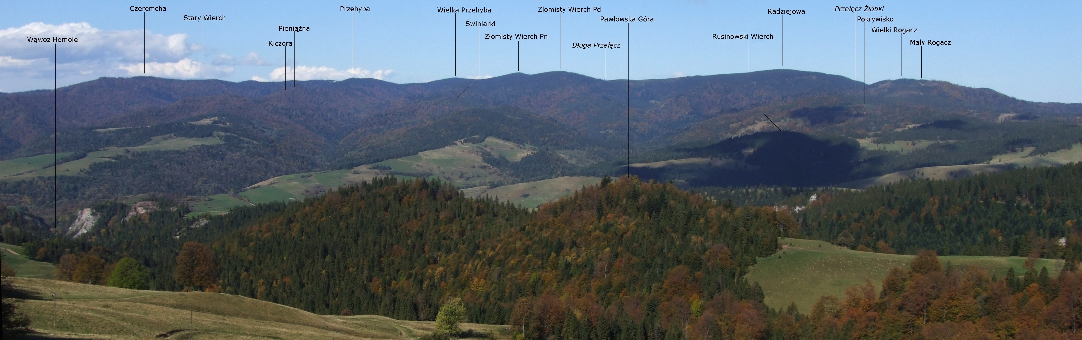 Pasmo Radziejowej w Beskidzie Sądeckim. Widok spod Wysokich Skałek